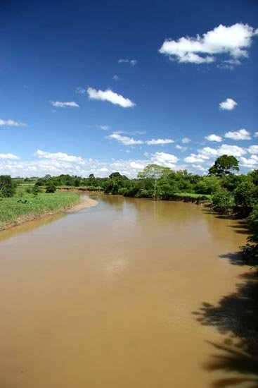 Orillas del Río San Jorge.